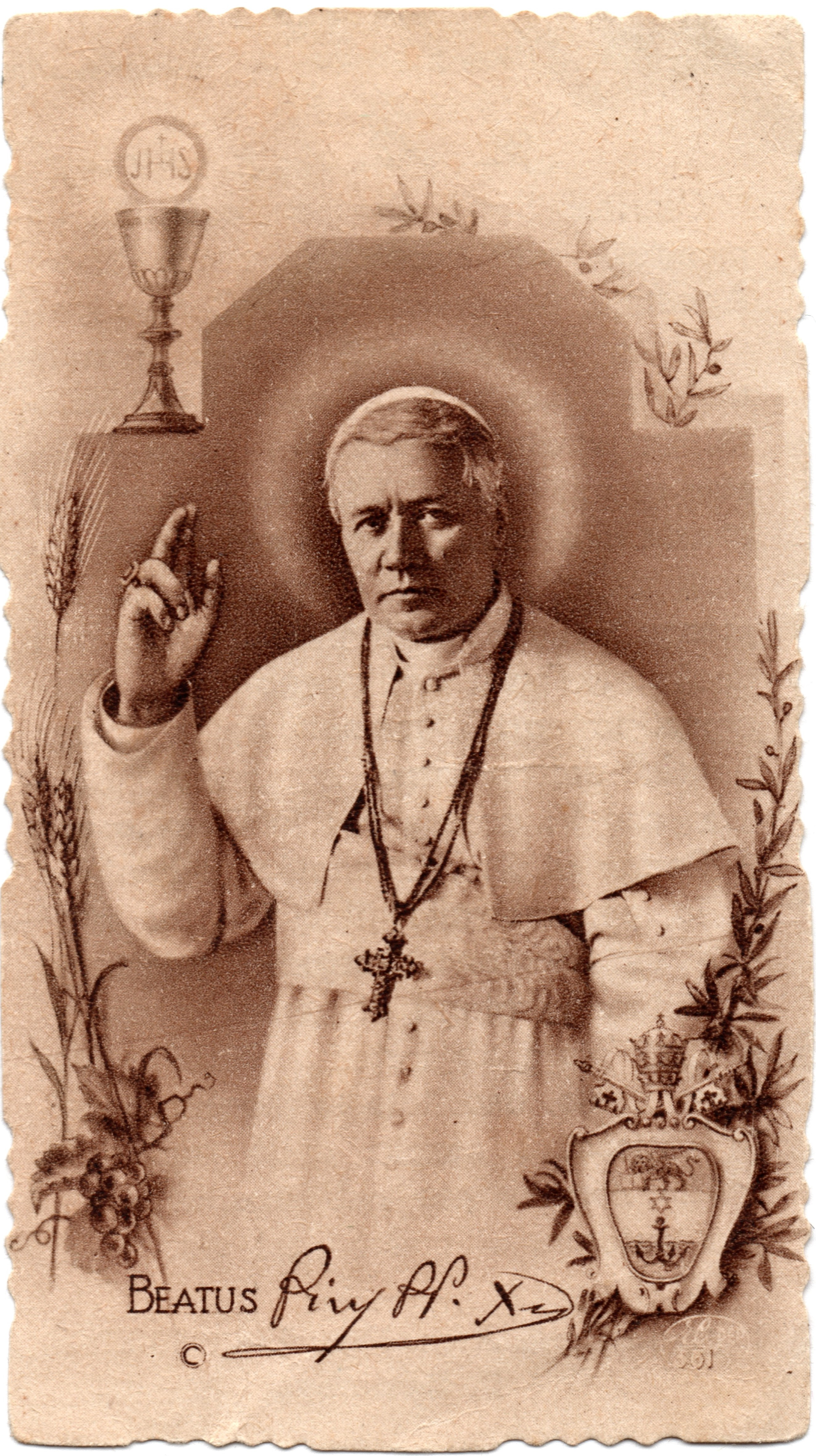 Papst Pius X. "Heiligenbild" mit Wappen und Signatur